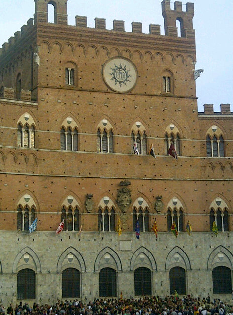 Trifore di Palazzo Pubblico, Siena dopo l'estrazione di domenica 27 maggio 2012